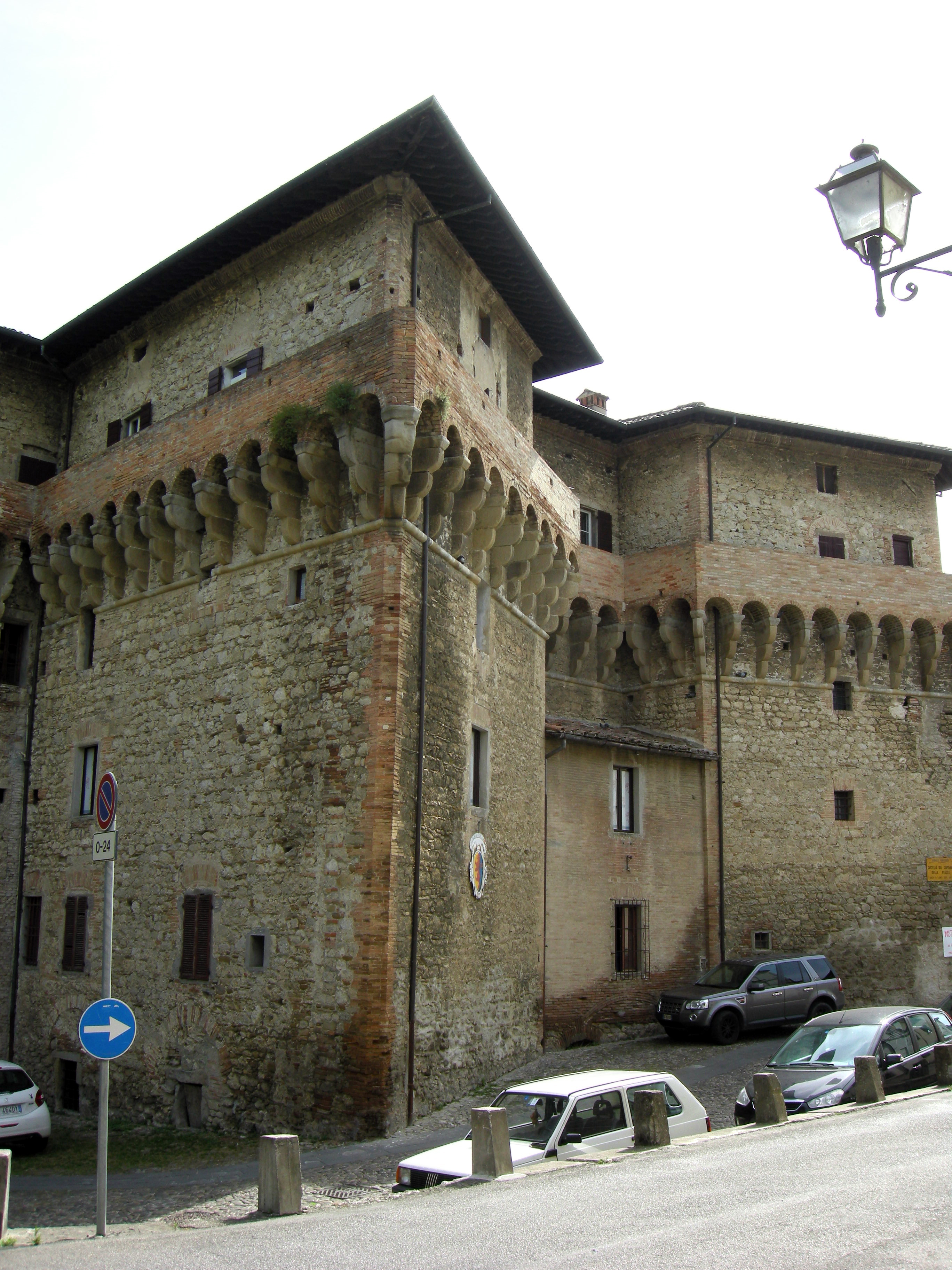 Castrocaro Terme e Terra del Sole